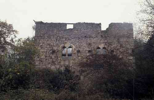 Artzamendi Torre, foto tomada en 1987